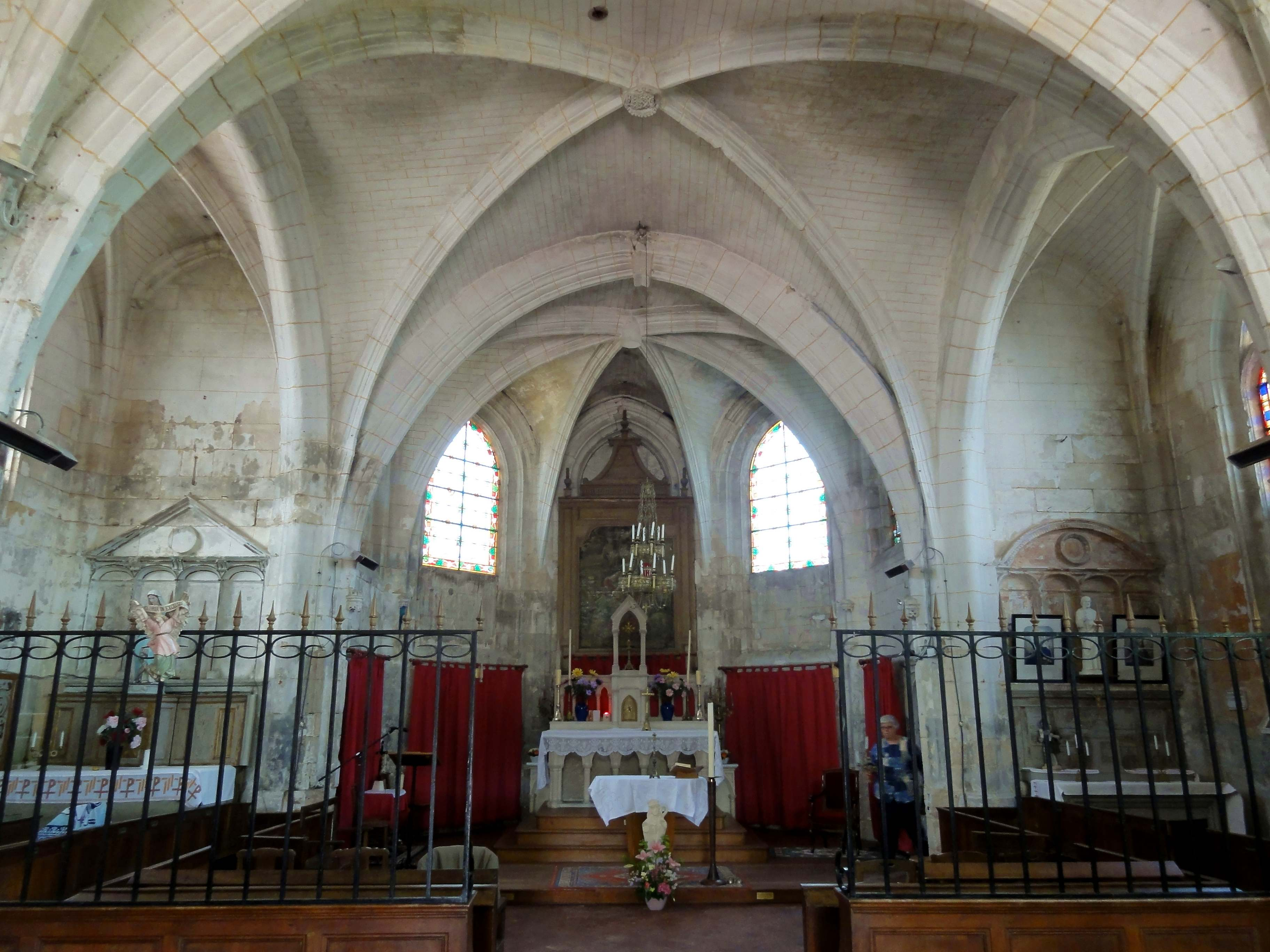 Nef, vue vers l'est.